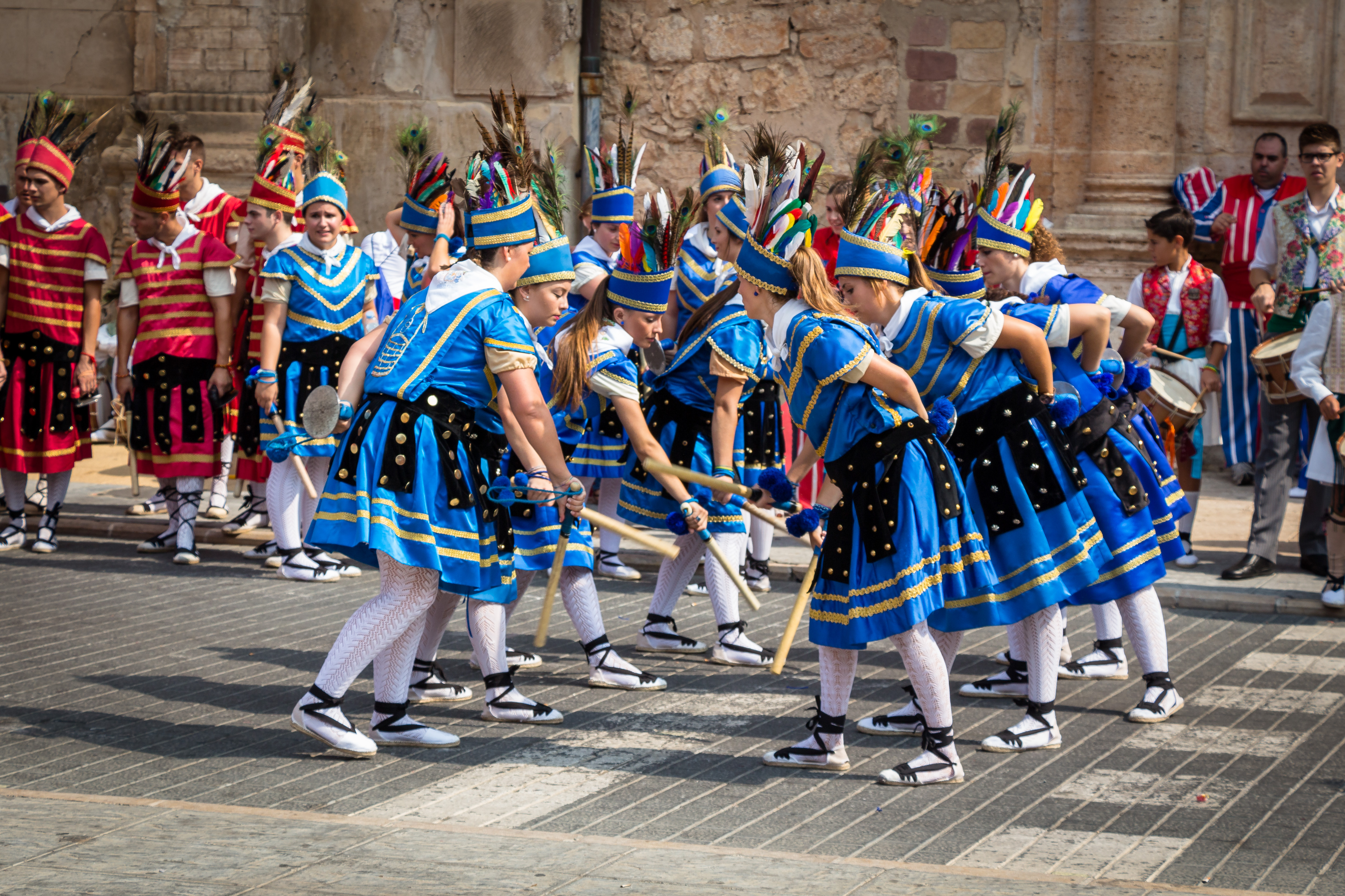 Els Bastonets es un enérgico baile de orígenes guerreros. Aquí se puede ver al grupo femenino que apareció en 1980 para bailar junto a los grupos masculinos ya existentes. This is a photography of a Folklore festival in Spain (Wikidata id Q3290365).